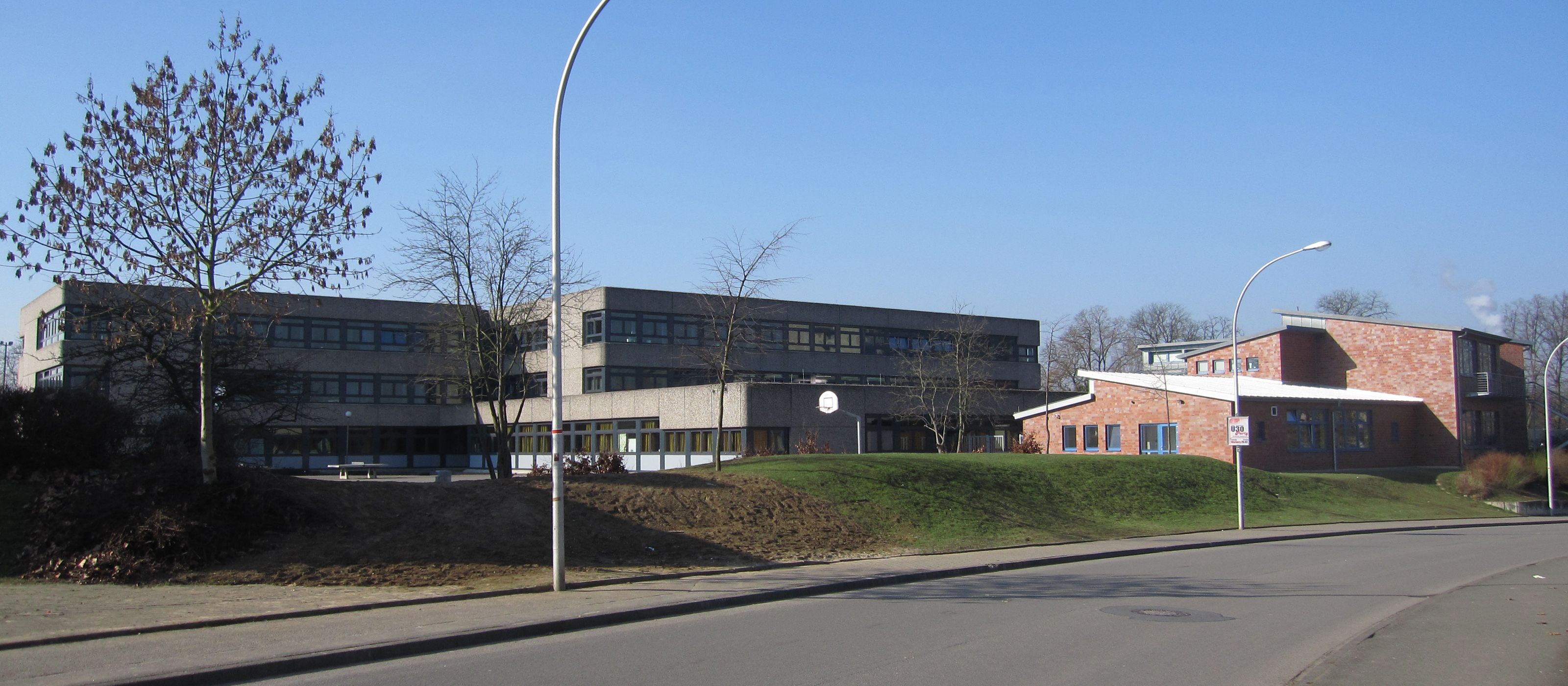 Gebäudekomplex der Haupt- und Realschule Warburg auf der Hüffert.